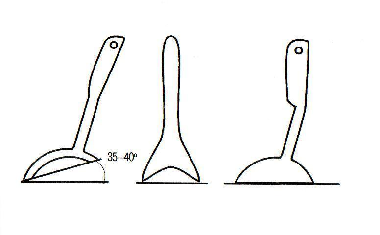 Рисунок приспособления для ловли сома - квока.